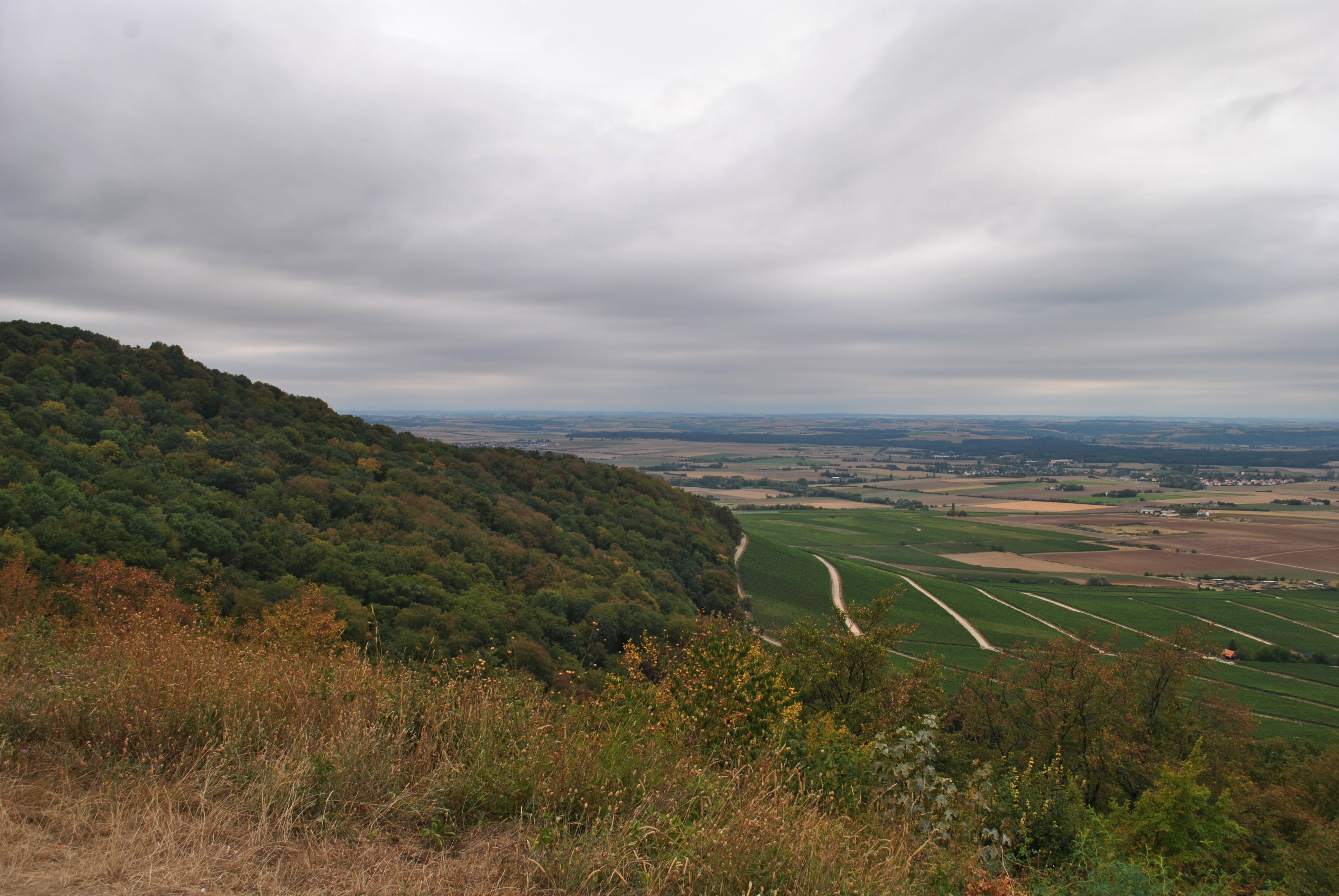 Schwanberg im Steigerwald